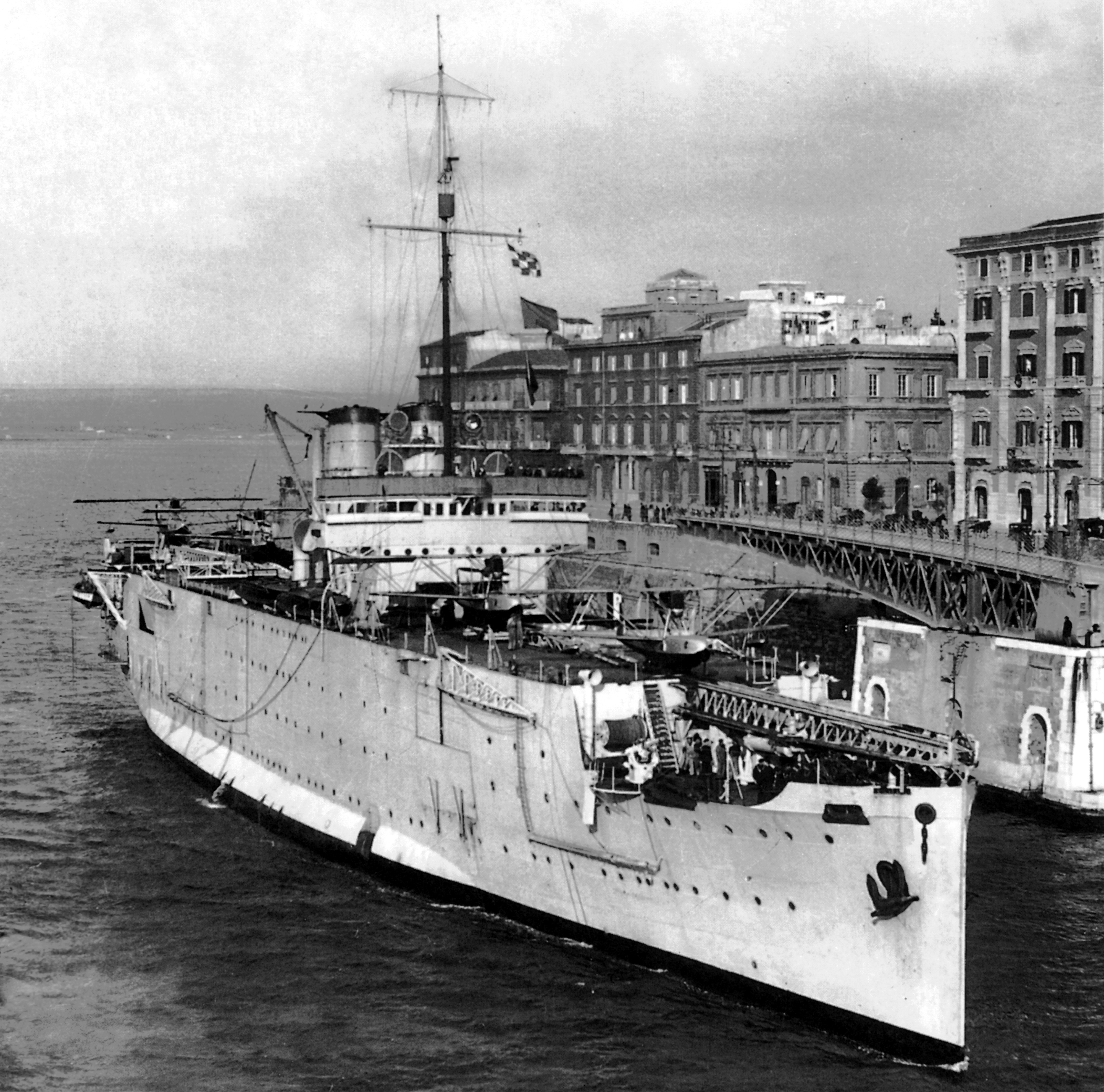 La nave appoggio idrovolanti Giuseppe Miraglia in uscita dal Mar Piccolo attraverso il canale navigabile di Taranto